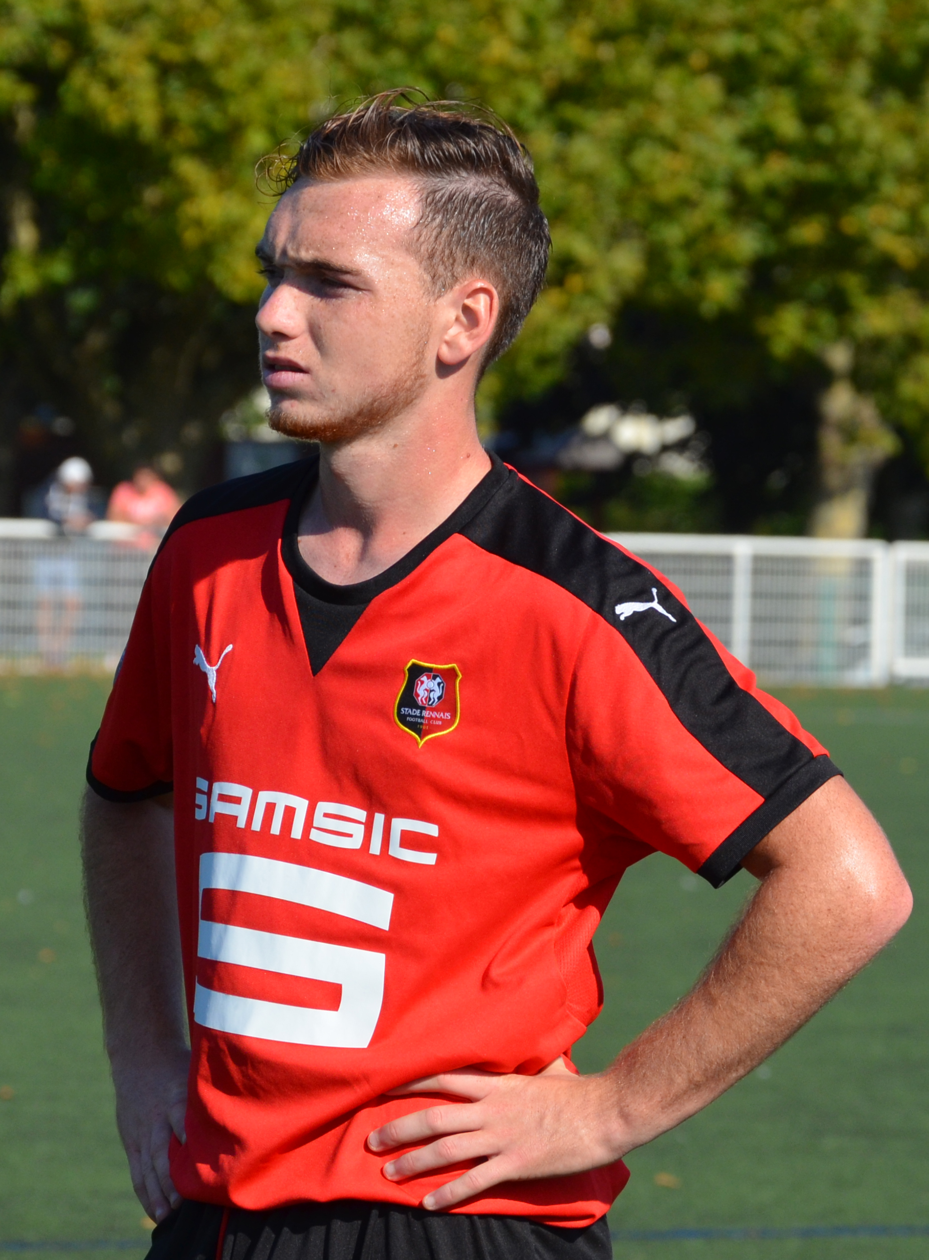 Photographie de Nicolas Janvier lors d'un match de moins de 19 ans Nationaux opposant l'US Avranches au Stade rennais le 27 septembre 2015.